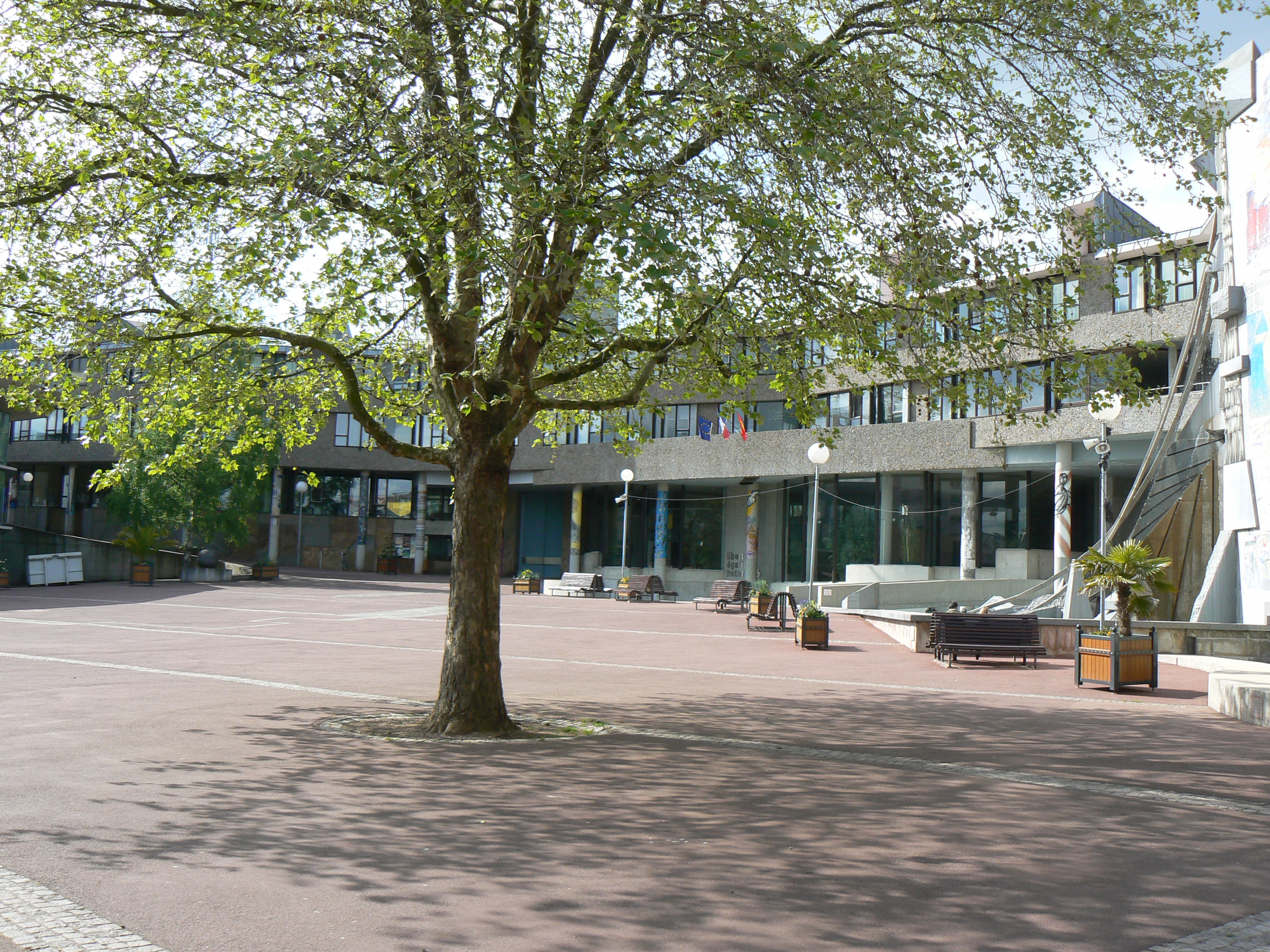 Hérouville Saint Clair, Citadelle douce (Hotel de ville), place François Mitterrand et arbre de la liberté.